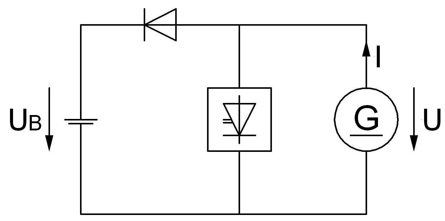 Nutzbremsung mit Thyristorschalter